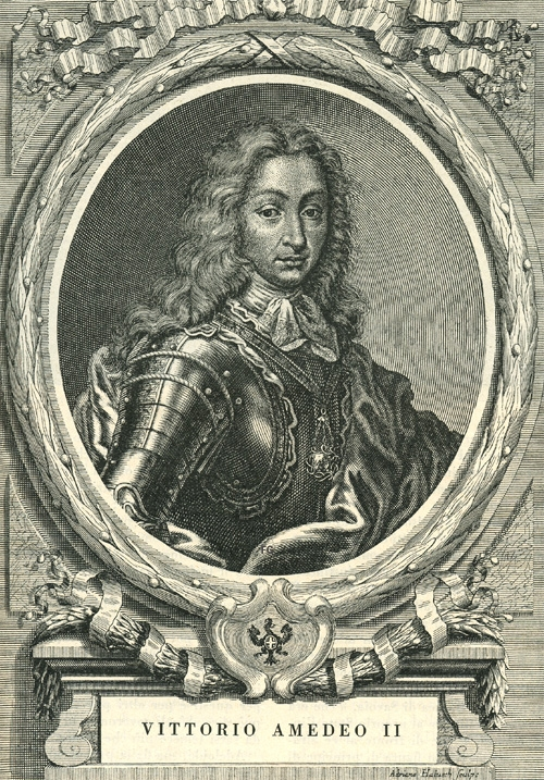 Víctor Amadeo II de Saboya (Vittorio Amedeo II di Savoia) (1666-1732). Duque de Saboya (1675-1732), Rey de Sicilia (1713-1720), Rey de Cerdeña (1720-1732).